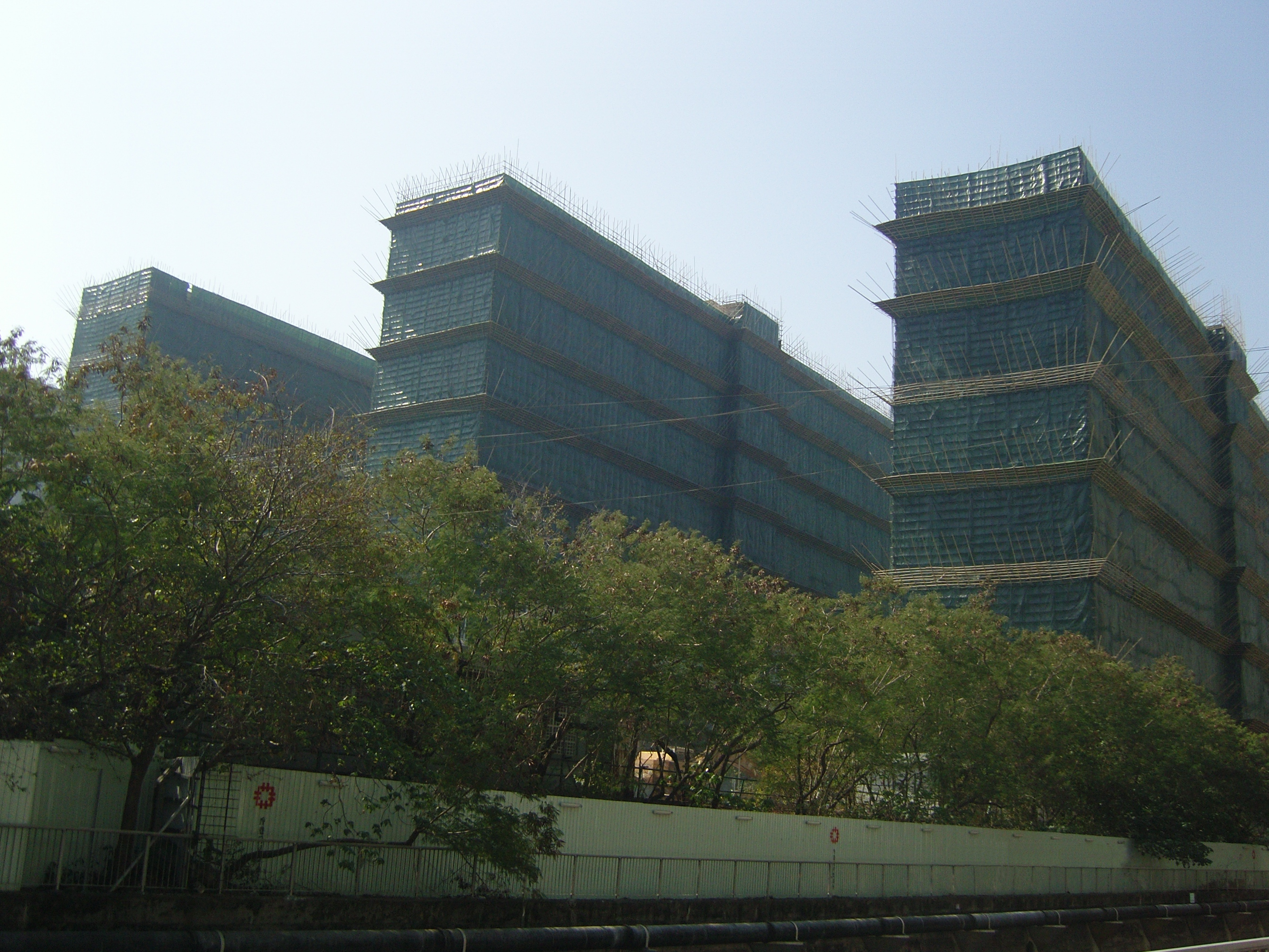 中文（香港）: 清拆中的黃竹坑邨